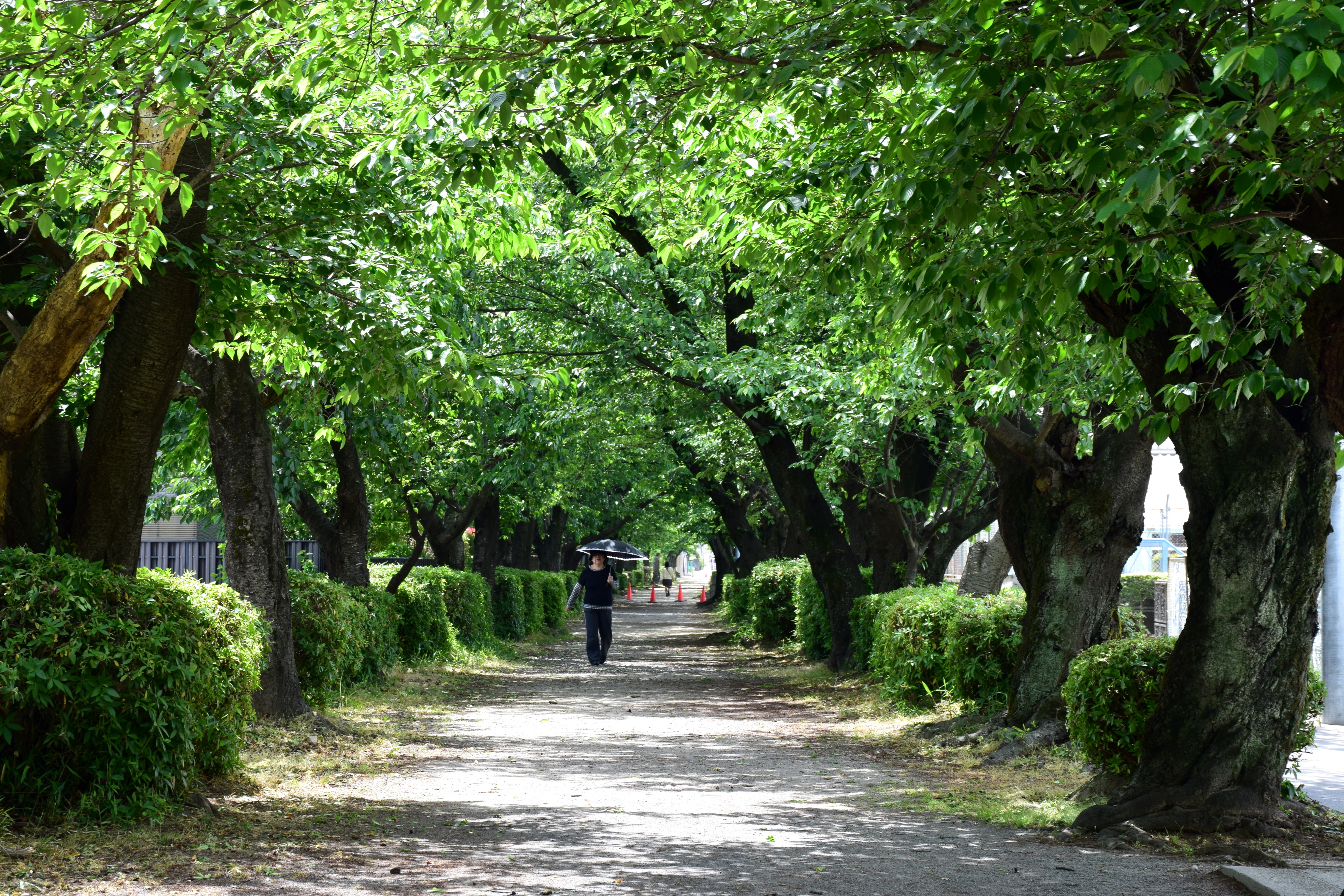 伊多波刀神社参道